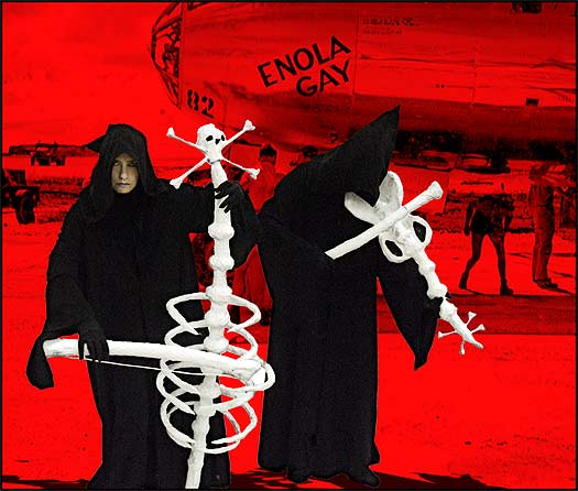 ilanit Magarshak-Riegg und Sir ladybug beetle erteilt durch Urheber